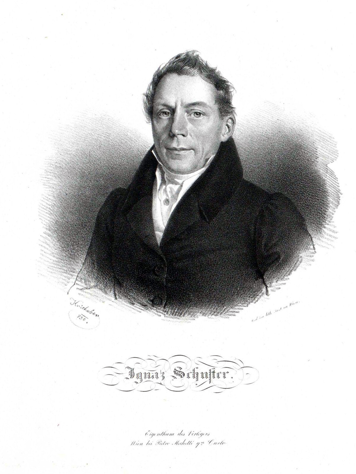 Ignaz Schuster, Lithographie von Josef Kriehuber, 1830